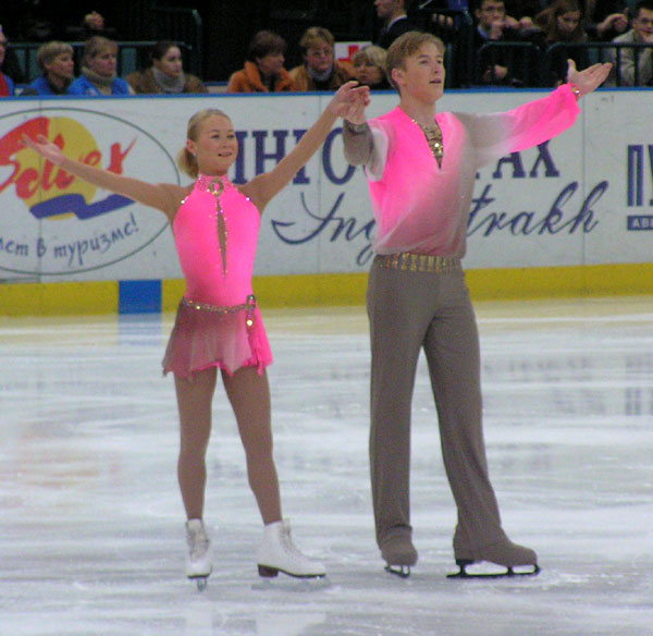 Julia Obertas & Sergei Slawnow während der Russischen Meisterschaften 2005